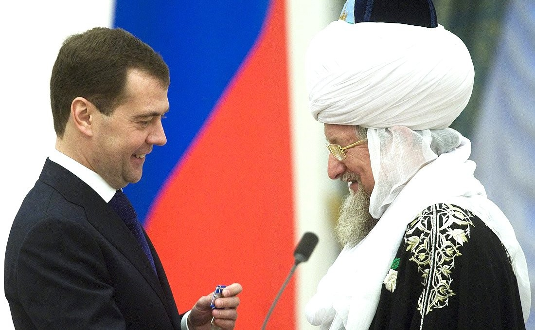 Вручение ордена Почёта Т. Таджуддину